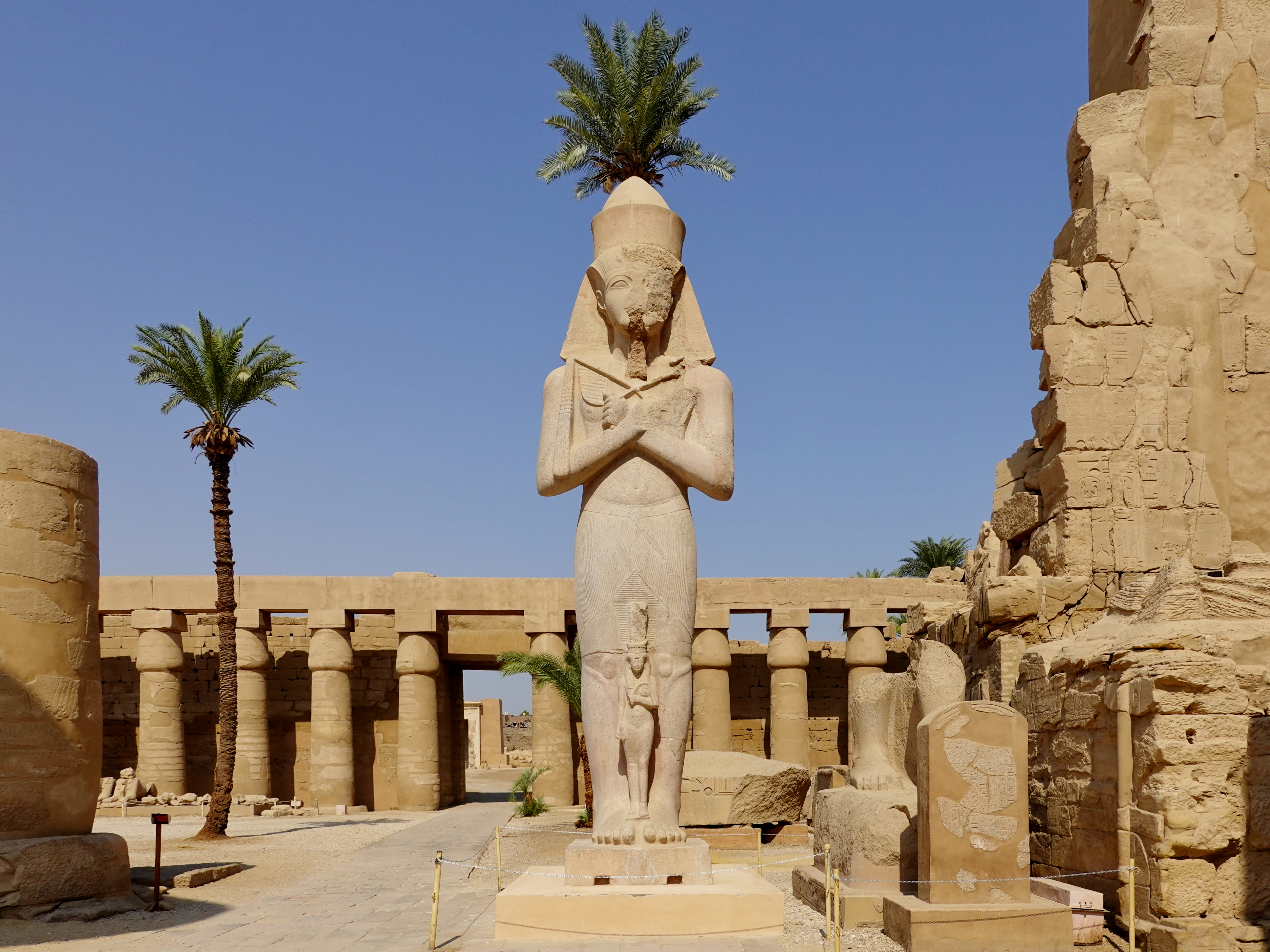 Von Pinudjem I. usurpierte Statue Ramses’ II. im Tempel von Karnak, nördlich von Luxor, Ägypten